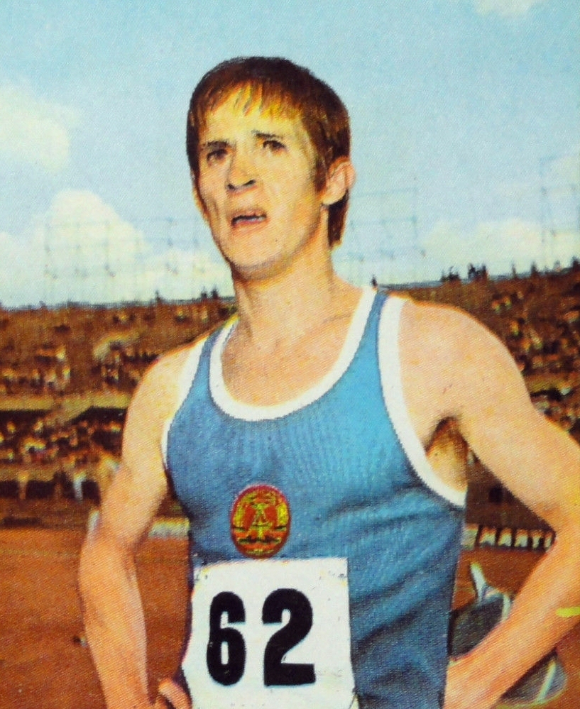 MUNCHEN 72-Figurina-Stickers-Panini-N° 70-FROMM recuperata